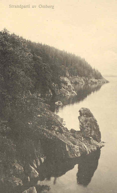 Omberg, ett gammalt vykort från sekelskiftet 1900.